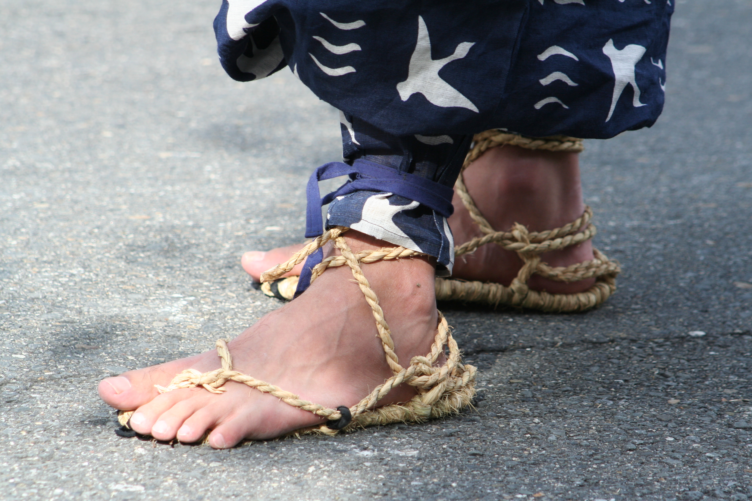 京都府京都市にて開催された時代祭。正午の御所から平安神宮までの行進の様子。2009年10月22日撮影。 草鞋。